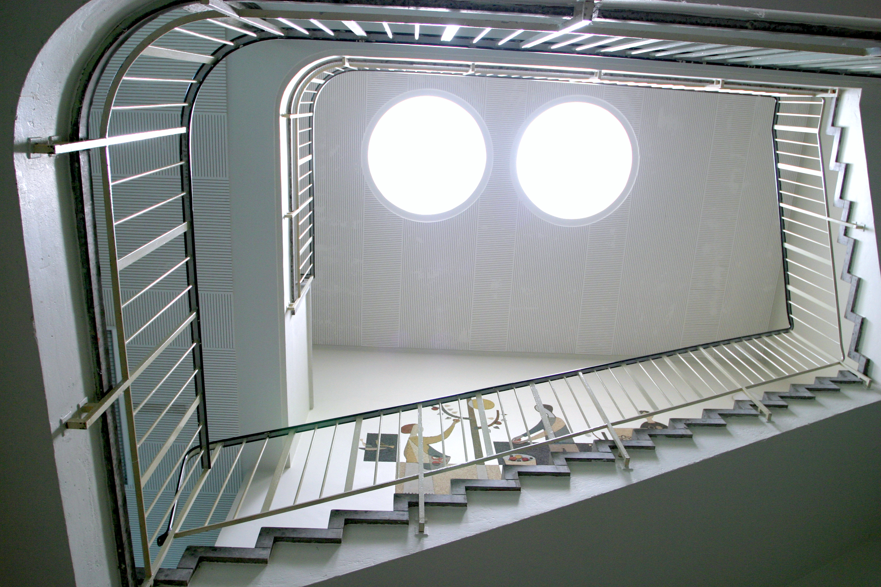 Blick ins Treppenhaus des westlichen Seitengebäudes der Deutschen Rentenversicherung Rheinland-Pfalz in Speyer. Foto: Walter Hoinka